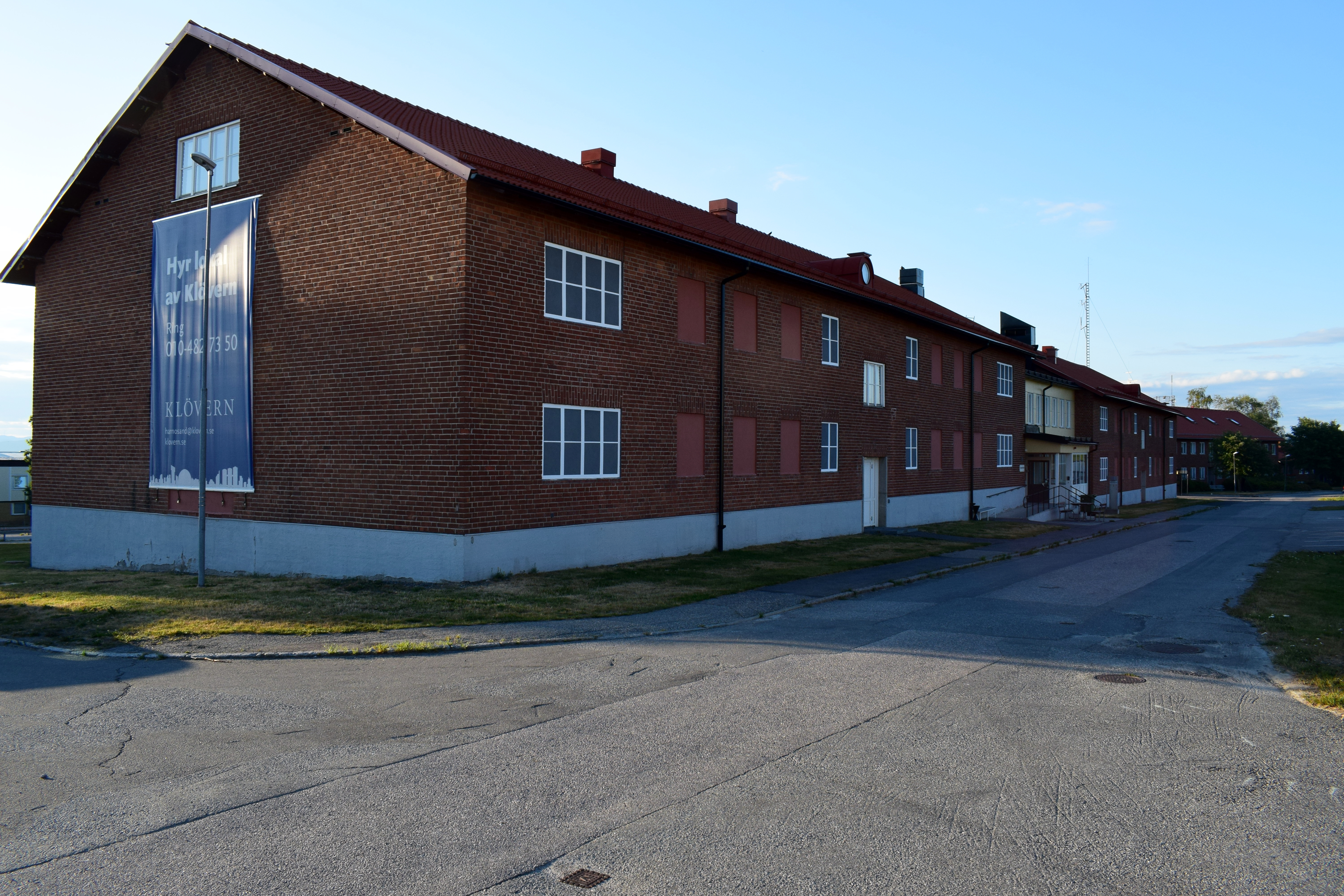 Tidigare kasernbyggnad i Härnösand.